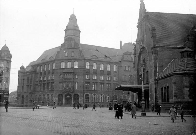 Stadt Gelsenkirchen mit Hauptpostamt